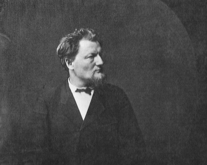 Selbstporträt Paul Sinners